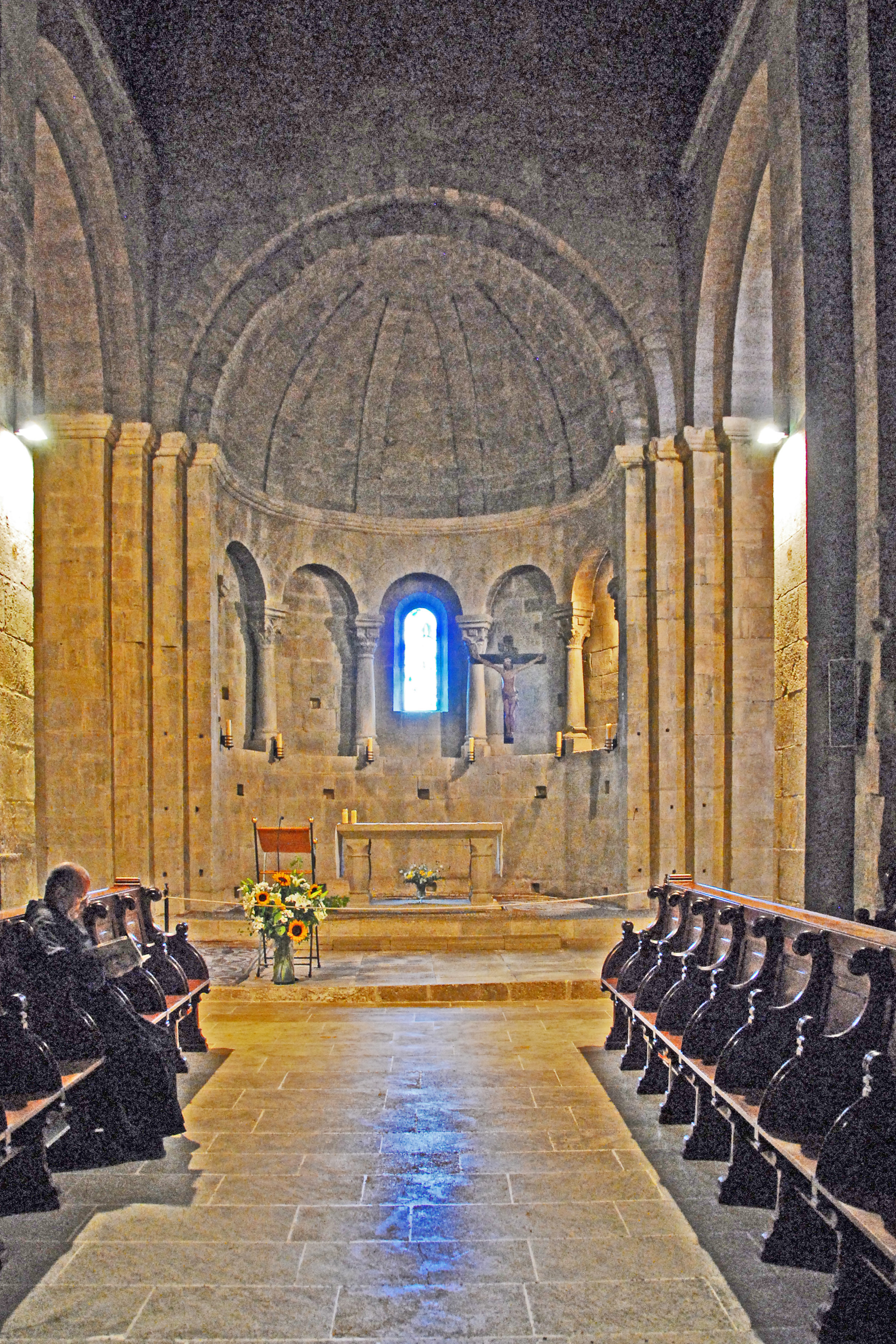 Prieuré de Ganagobie,Chor aus Schiff